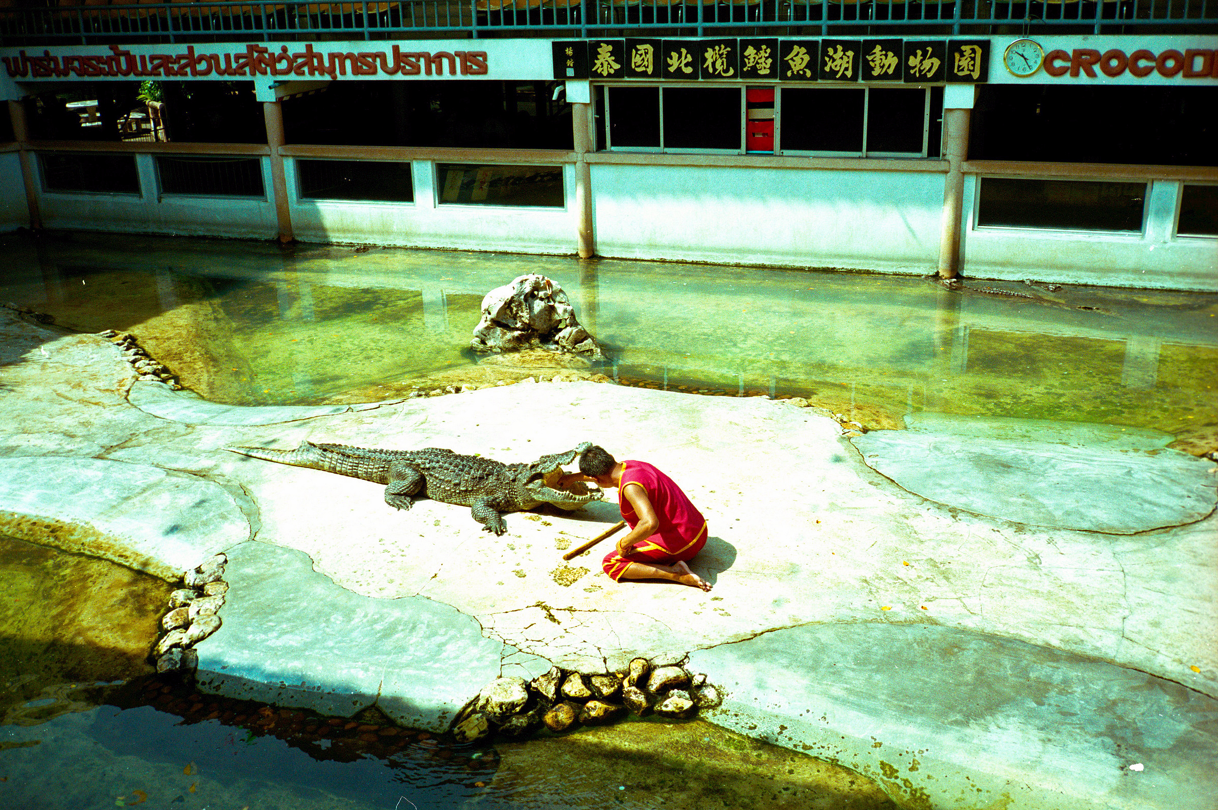 Bangkok Crocrodile Farmzh:泰国北榄鳄鱼湖动物园